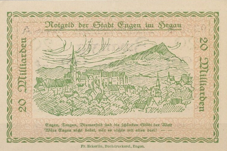 Deutschland (D) - Baden-Württemberg (BW) - Landkreis Konstanz (KN) - Engen: Notgeldschein über 20 Milliarden Mark / Rückseite (1923)